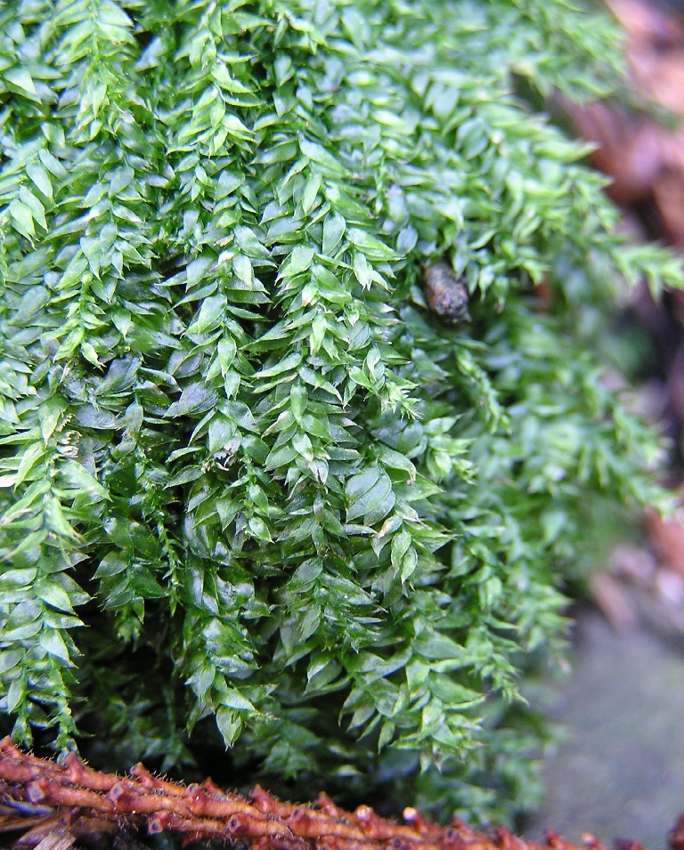 Plagiothecium succulentum am Rande eines Waldweges bei Monschau, Deutschland.